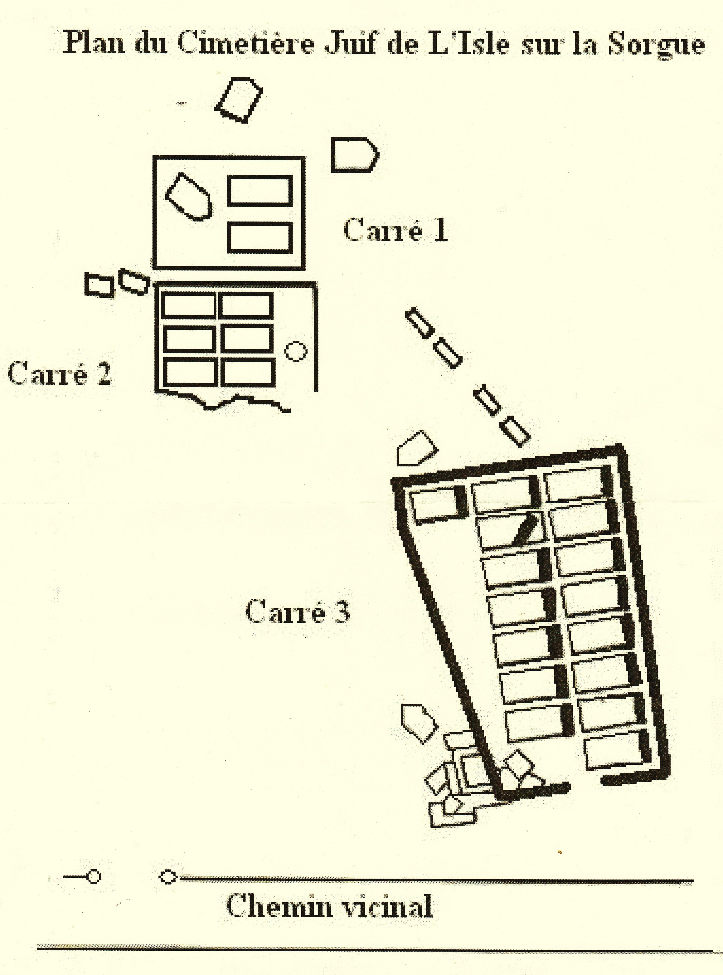 Plan du Cimetière israëlite de l'Isle-sur-la-Sorgue (84) en 2012